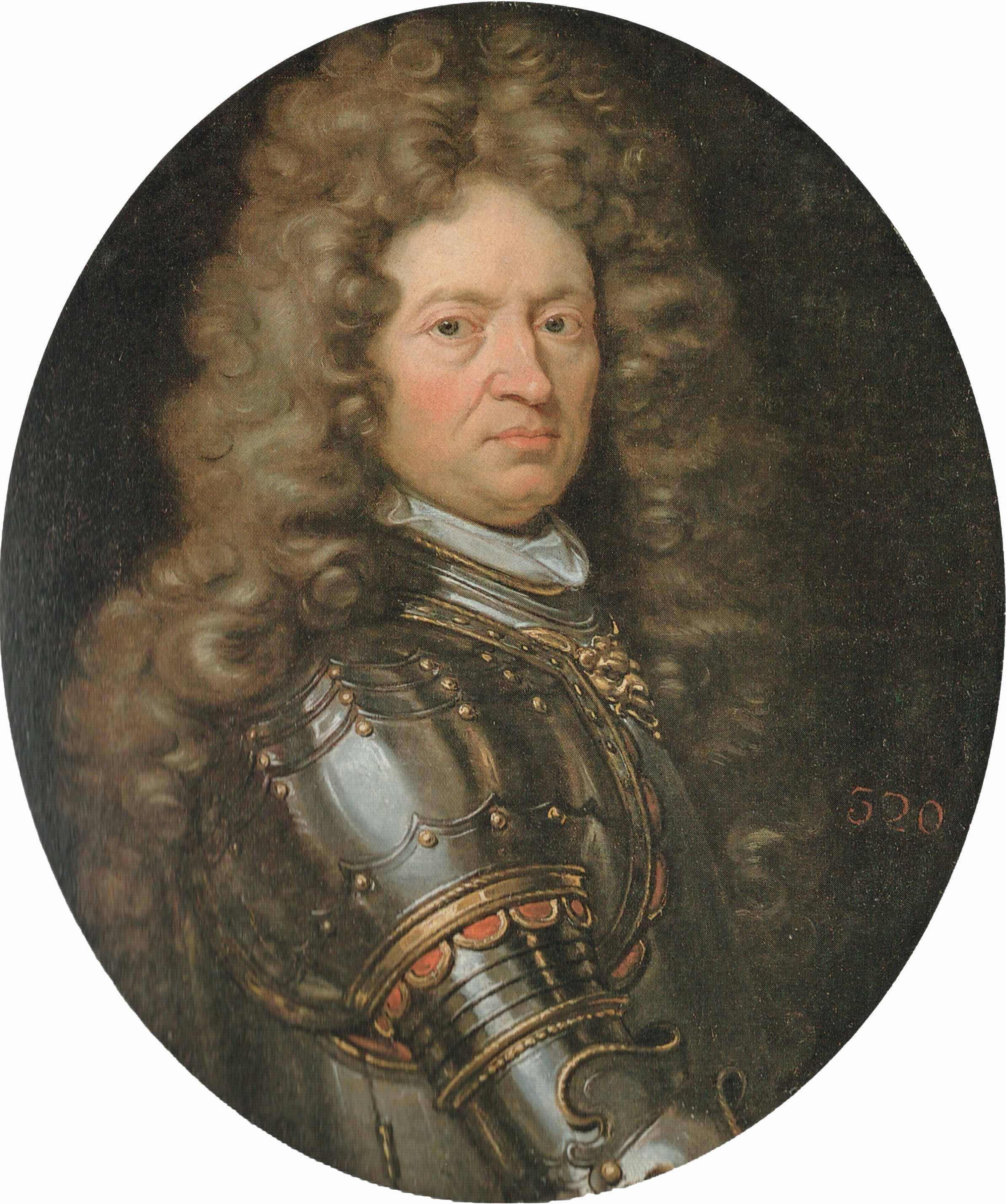 Gemälde von Johann Kasimir Kolb von Wartenberg (1643-1712)